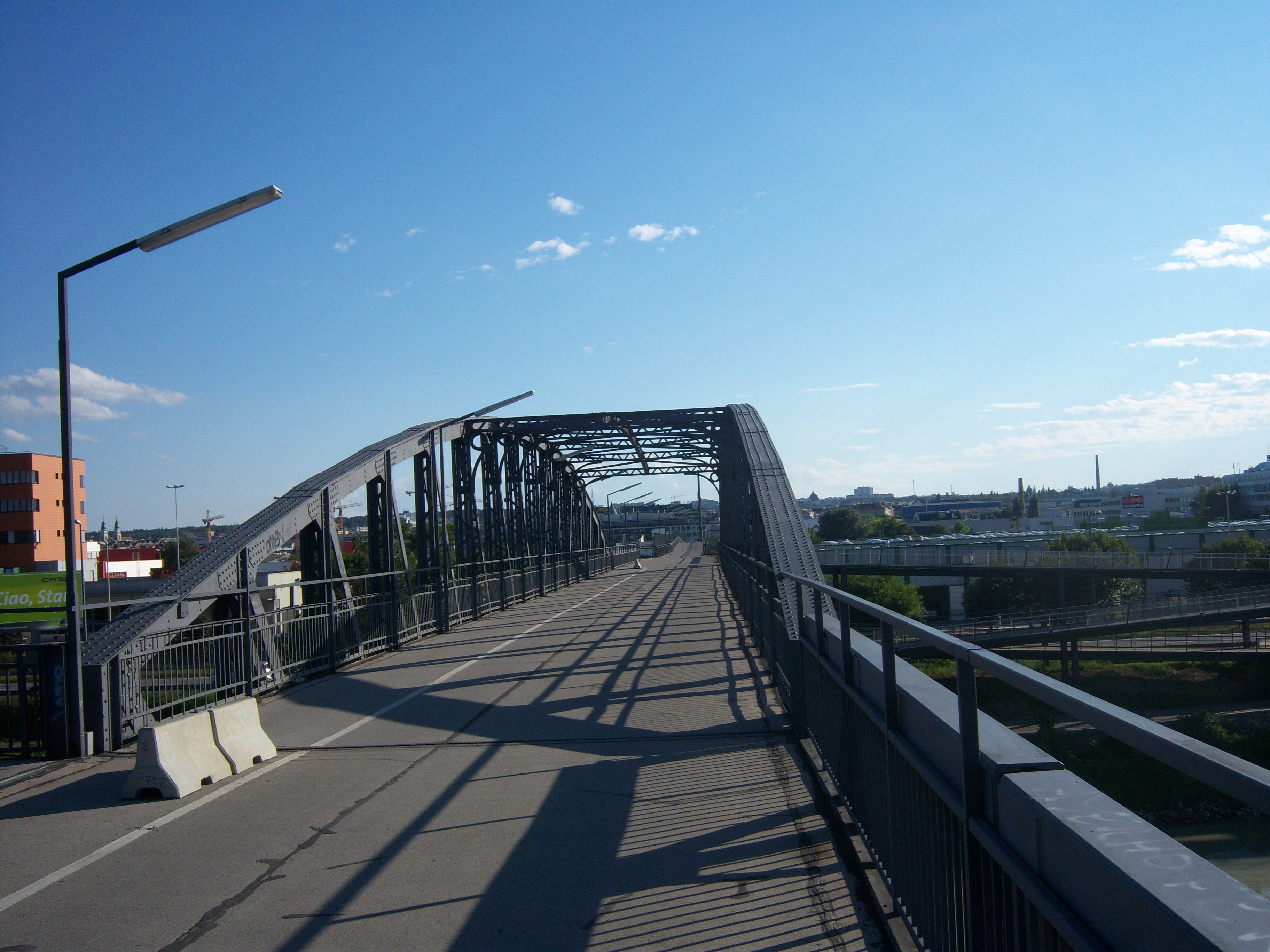 Gaswerksteg